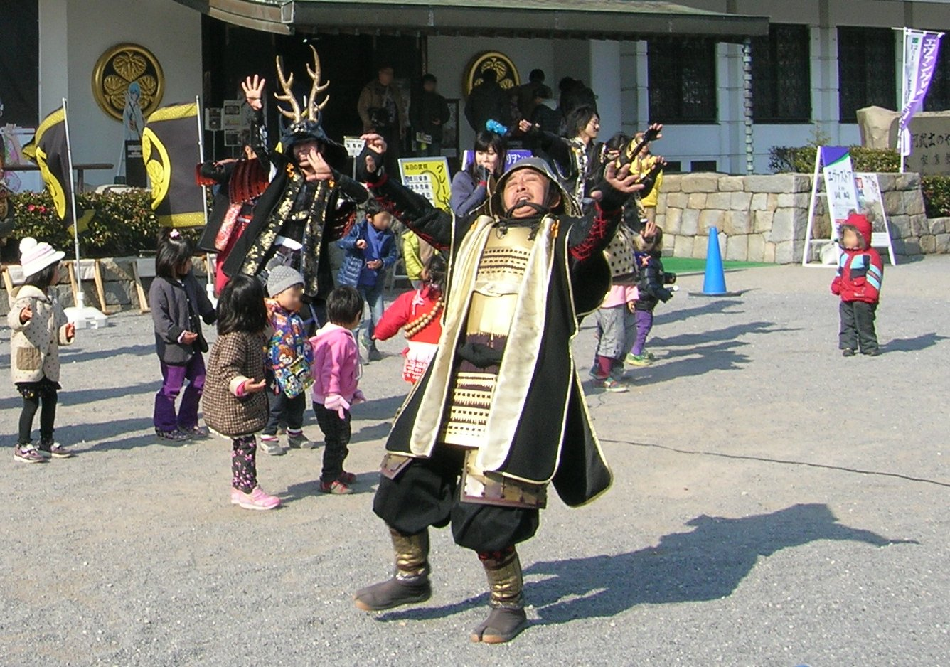 Aoi Bushō-tai Loc: Okazaki park. Okazaki city, Aichi Prefecture, Japan. 子供たちと踊るグレート家康公「葵」武将隊・正面は徳川家康 撮影場所 愛知県岡崎市・岡崎公園